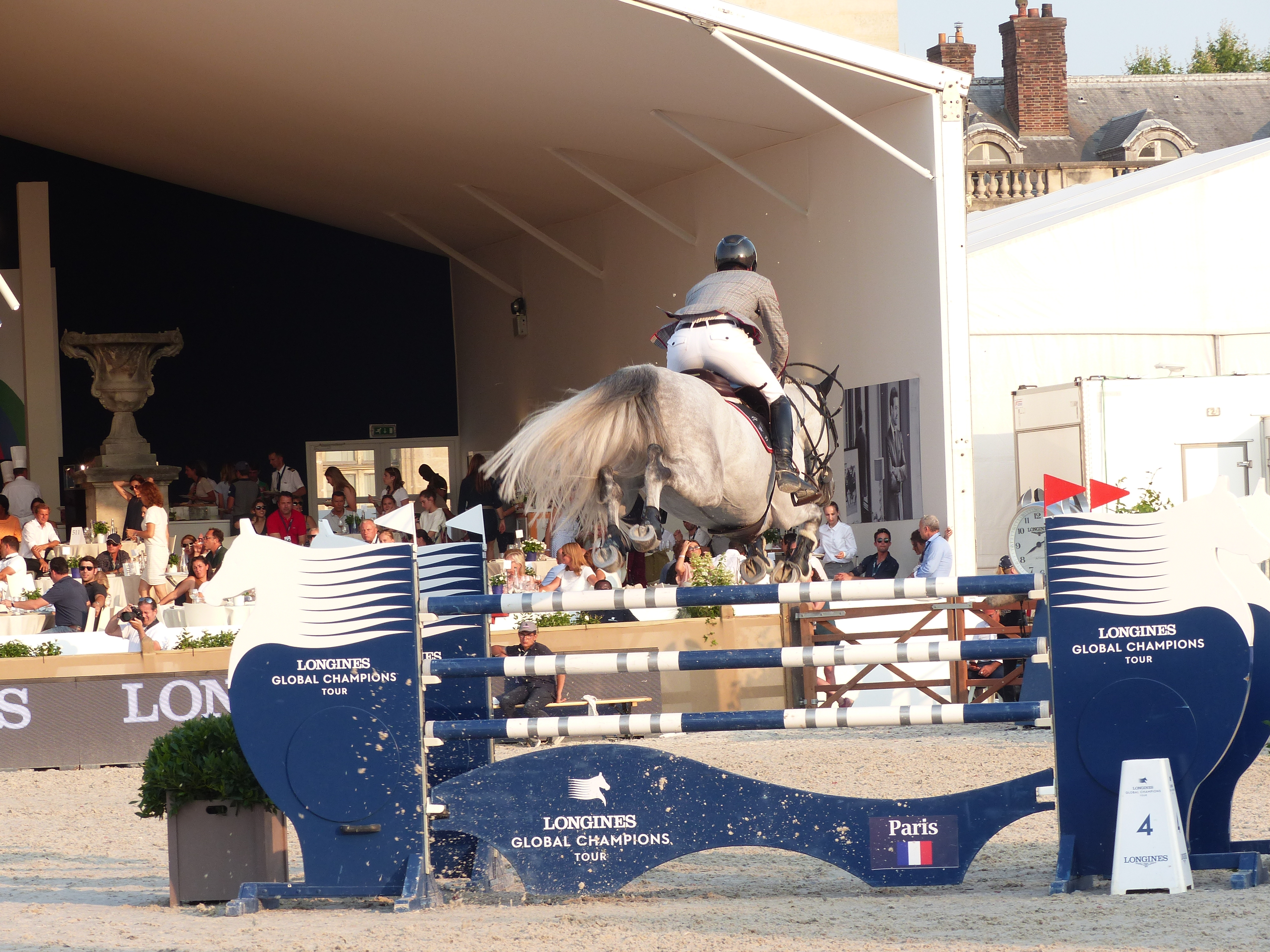 Olivier Philippaerts avec son cheval H&M Legend of Love lors du Paris Eiffel Jumping 2018.